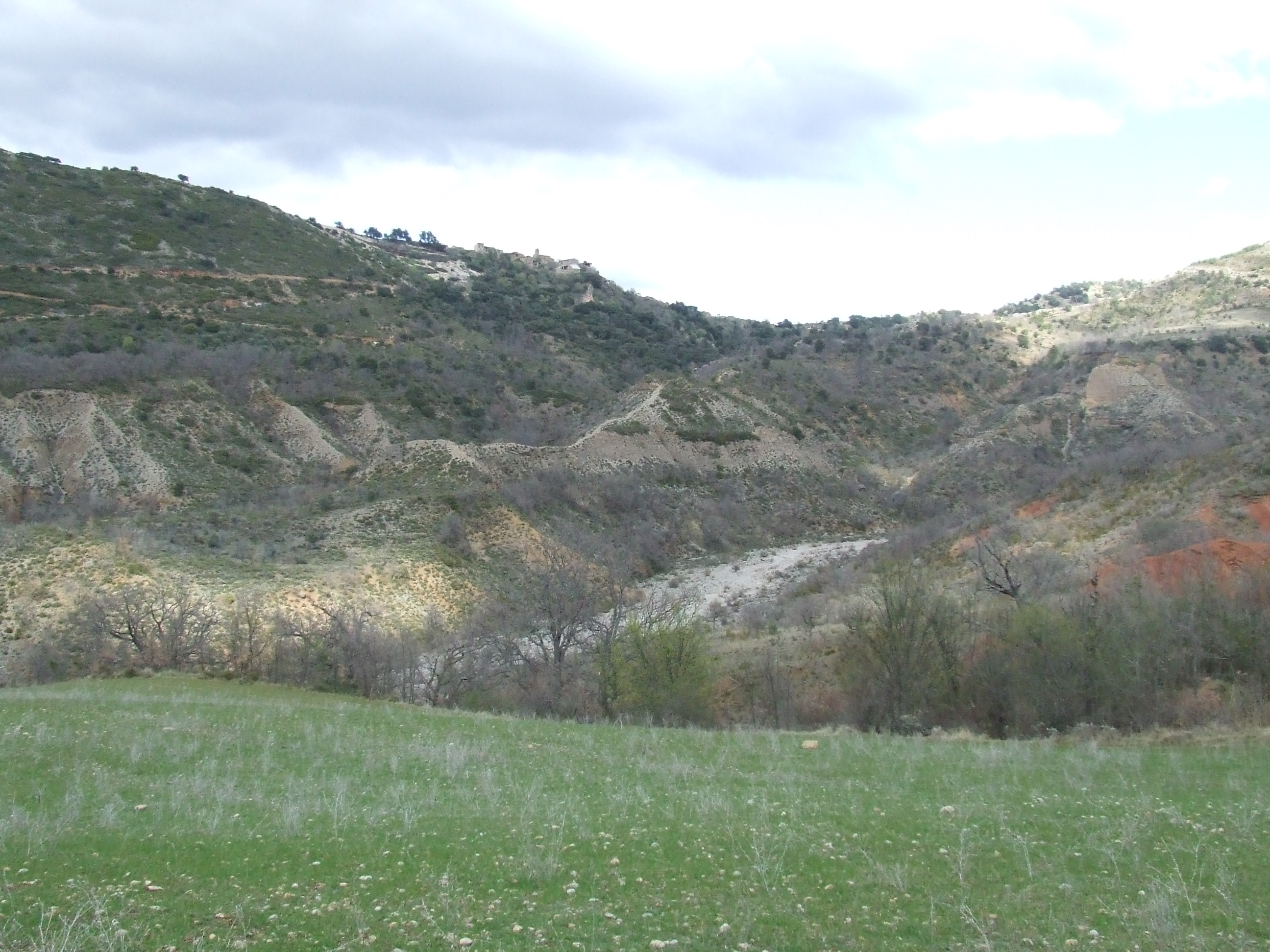 El barranc d'Esplugafreda sota mateix del poble de Sapeira (Tremp, Pallars Jussà)